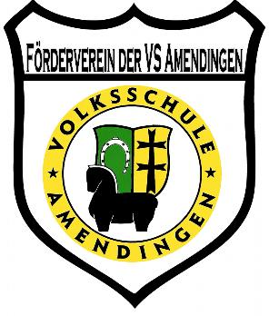 Wappen der Förderverein Amendingen